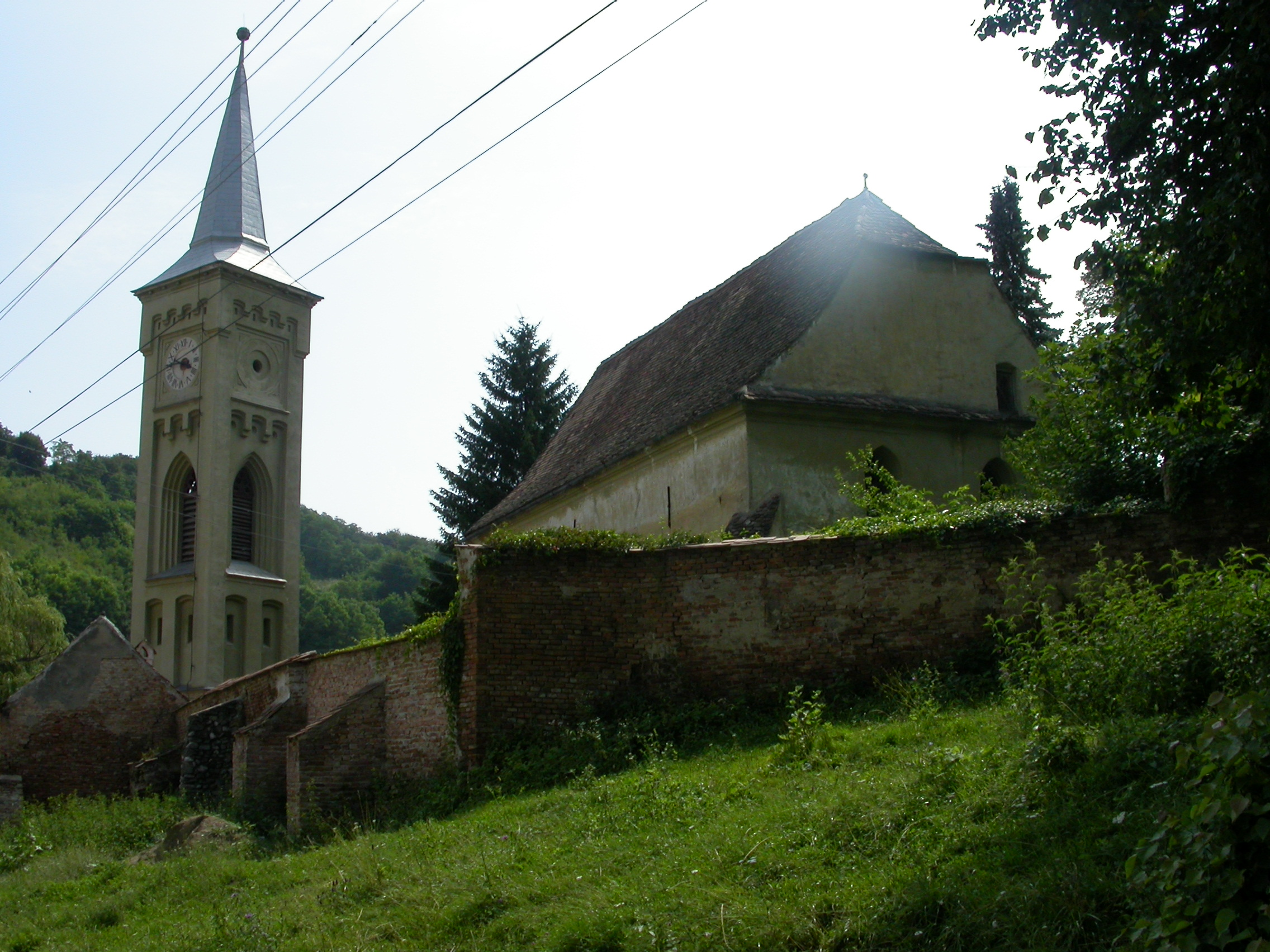 Ansamblul bisericii evanghelice fortificate, sf. sec. XIV- sec. XIX